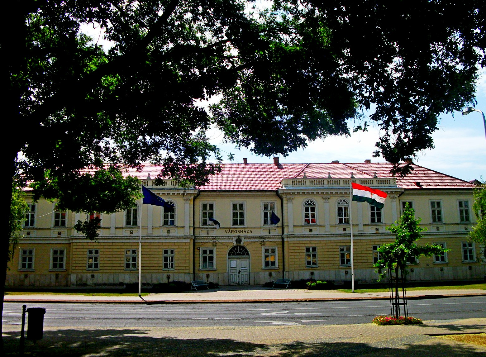 A hajdúszoboszlói városháza.